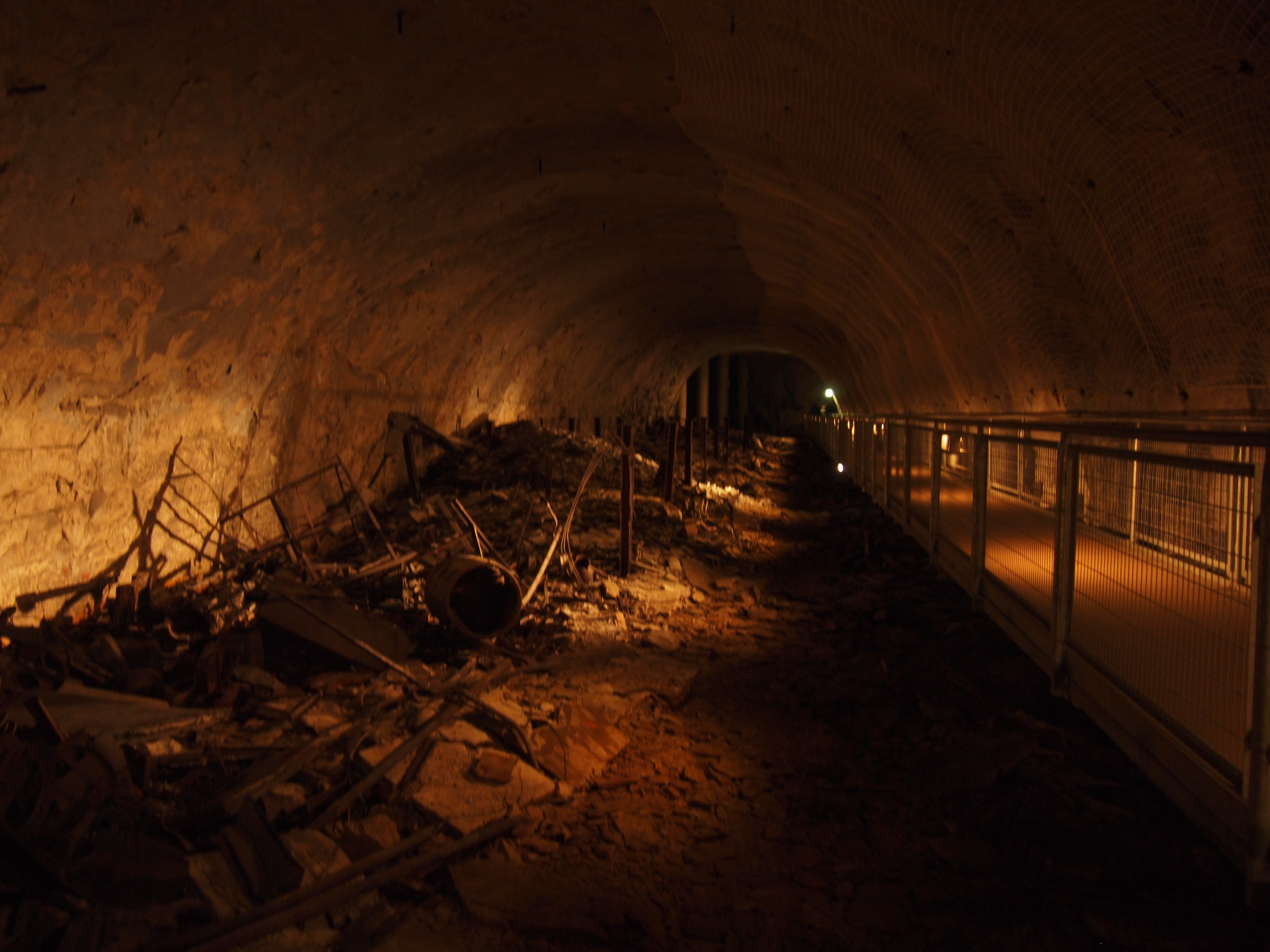 Mittelbau Dora, Besuchergalerie und Schrott auf dem Boden des rechten Längsstollens. Am Ende erkennbar ein Stollenbruch, verursacht durch darüberliegende Stollen des Anhydritabbaus mit neu eingezogenen Betonstützen